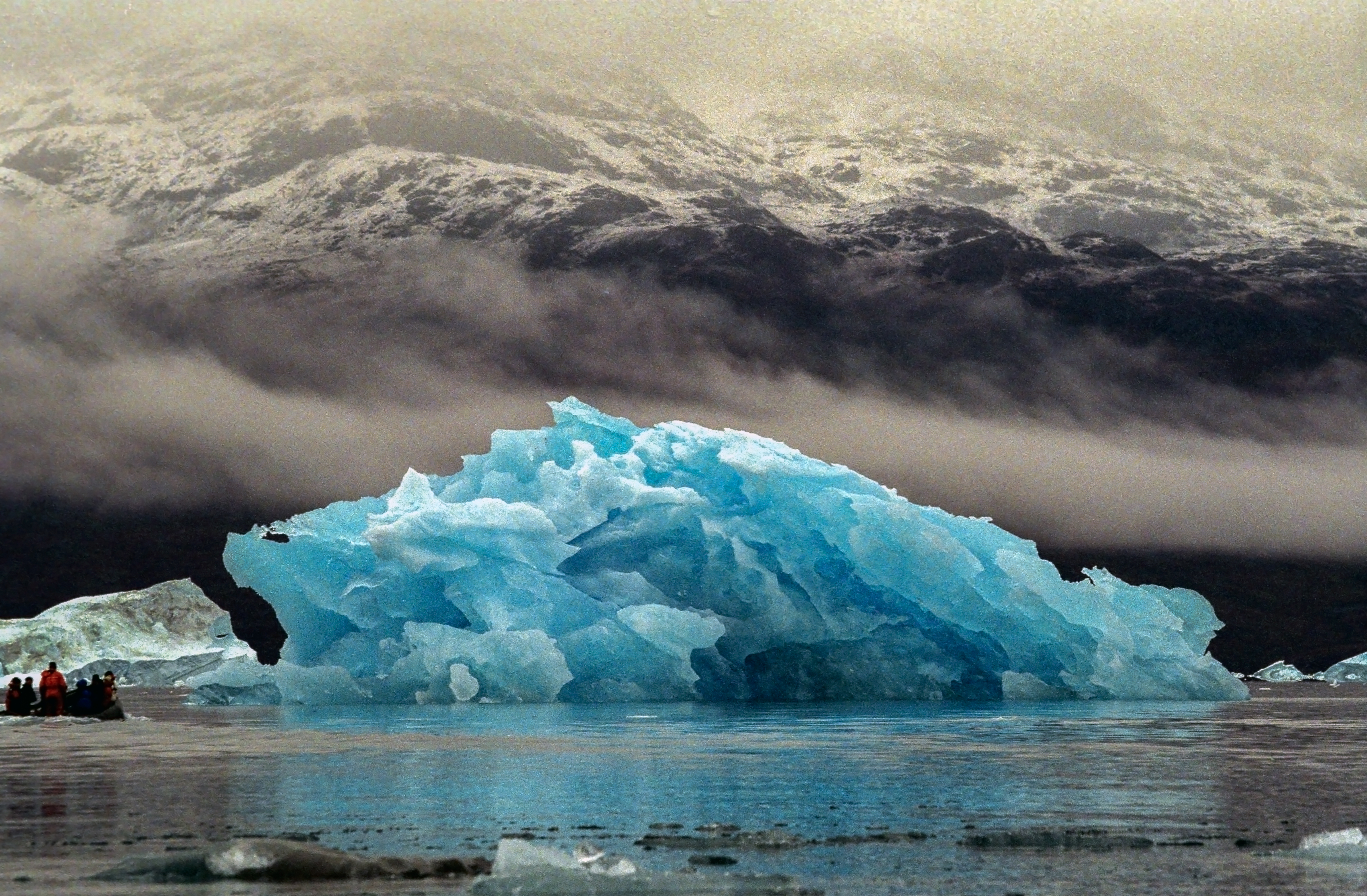 Greenland, Kong Oscar Fjord, iceberg